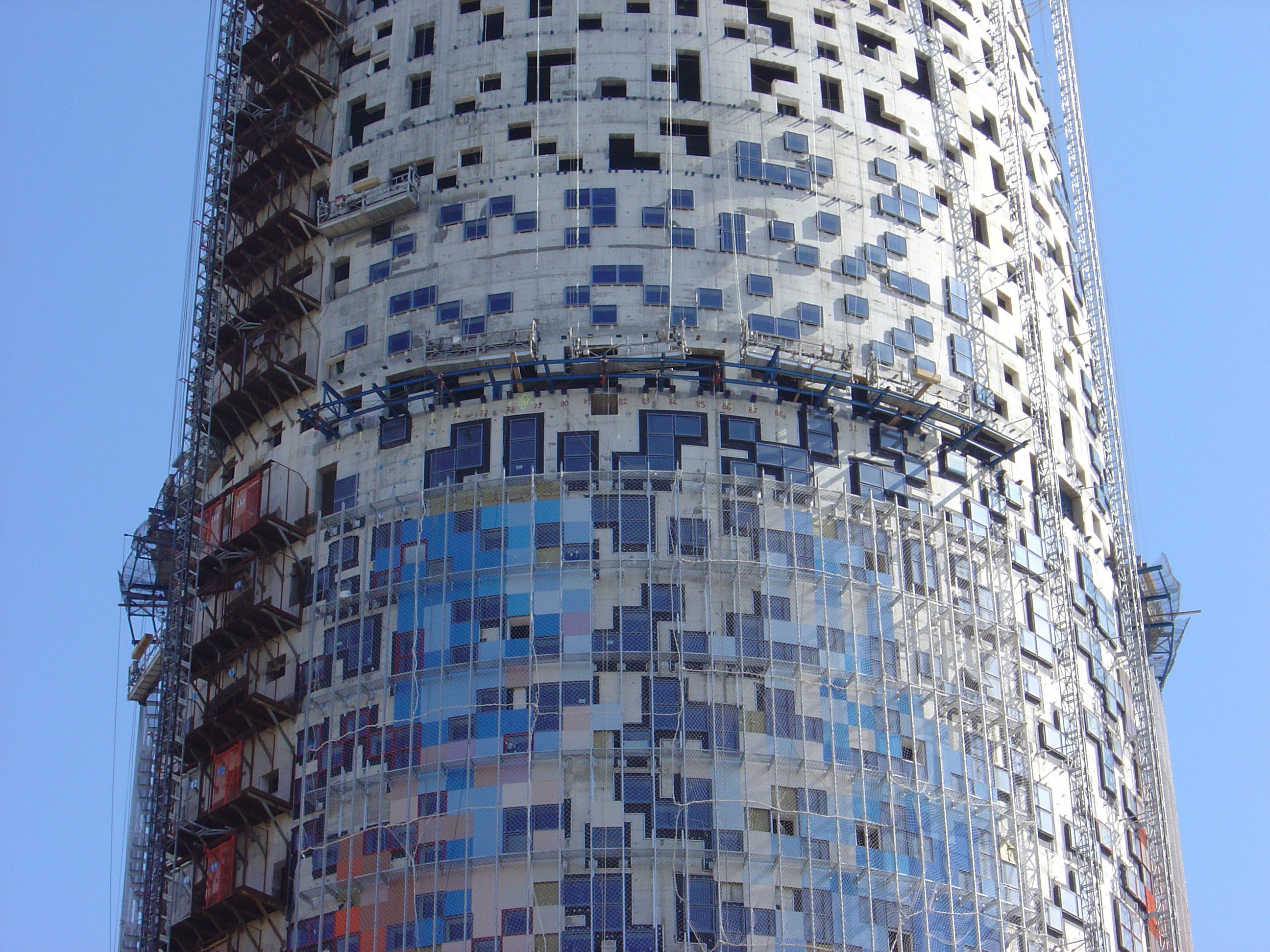 Torre Agbar, Hochhaus in Barcelona, Bauphase April 2004